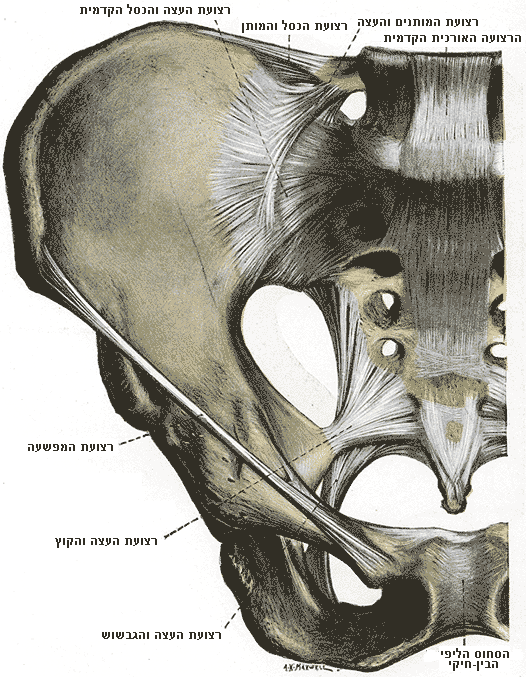 מפרקי האגן, מבט קדמי